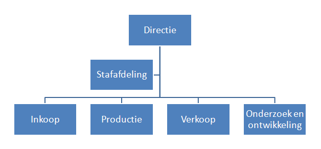 Een eenvoudig organisatieschema